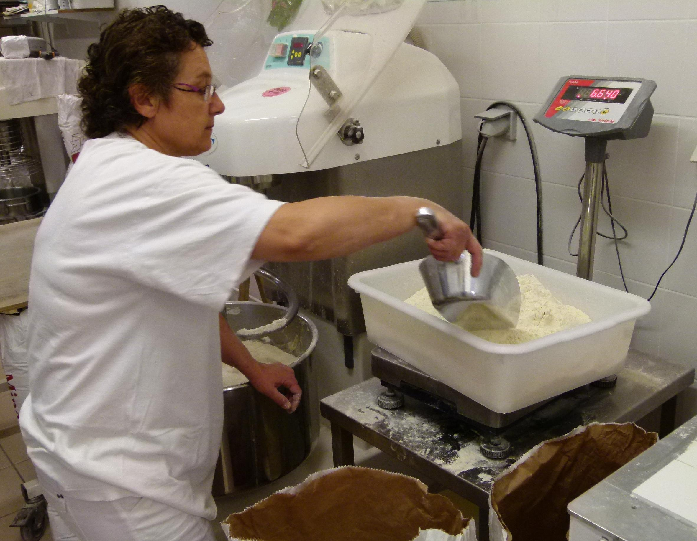 La boulangère pèse la farine